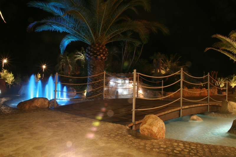 večerní proménáda v S. Benedettu d.T.